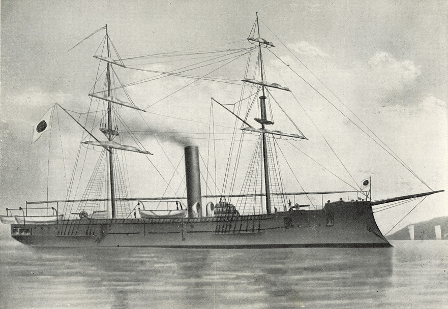 Japanese warship Azuma(Kotetu)